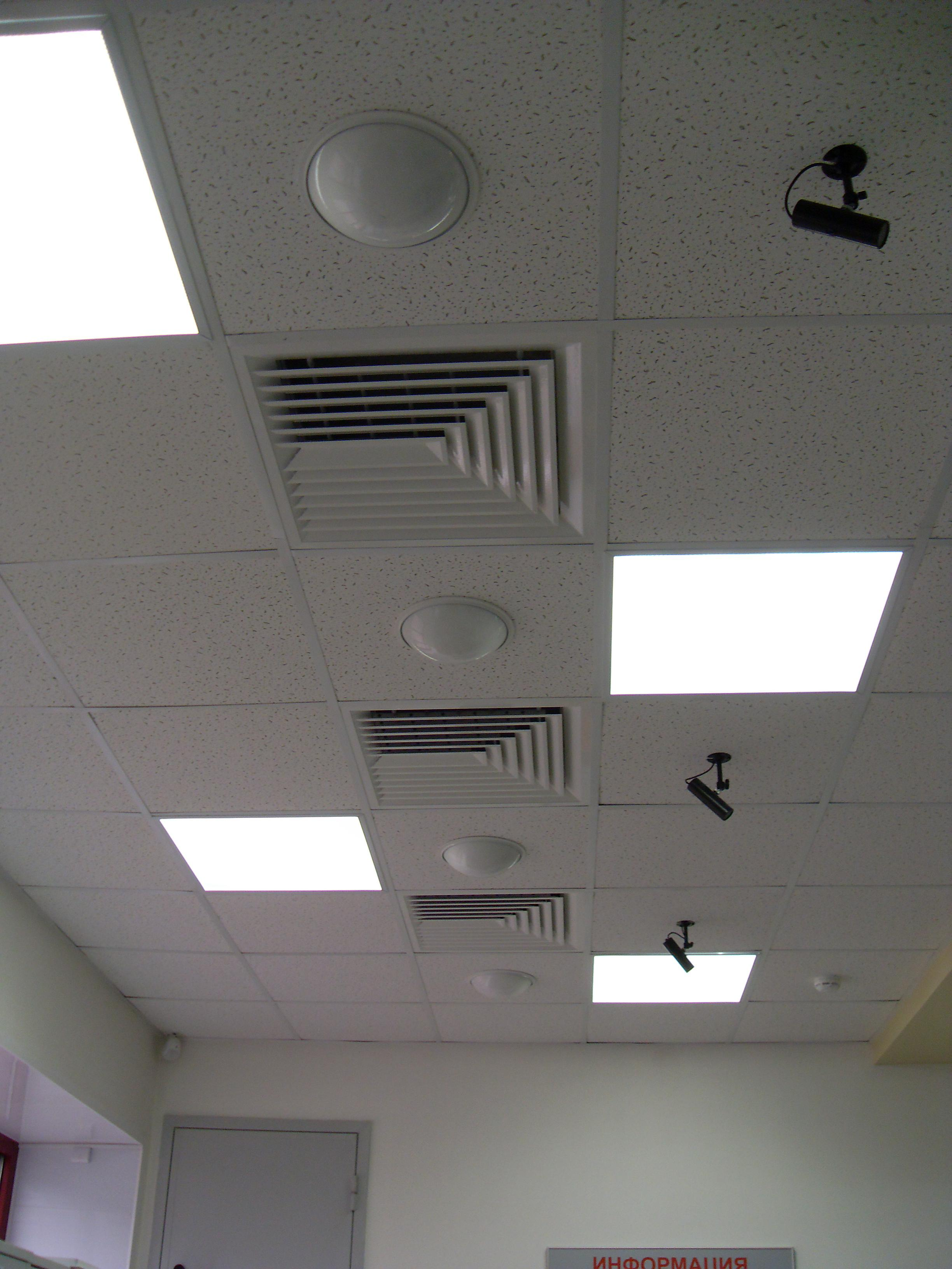 Система порошковго пожаротушения в магазине